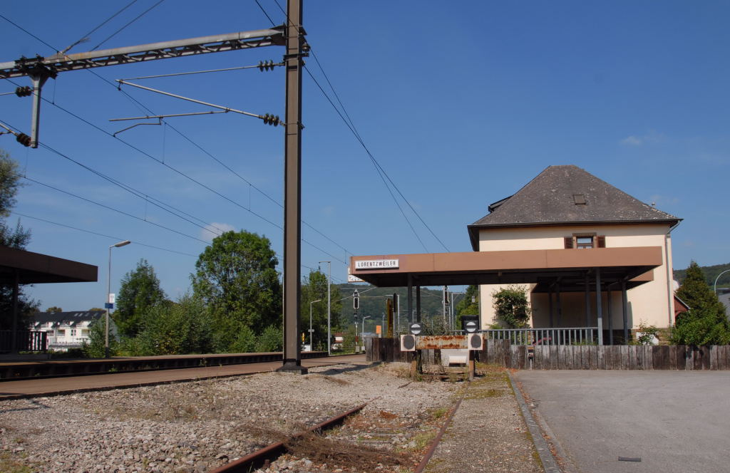 D'Gare zu Luerentzweiler.